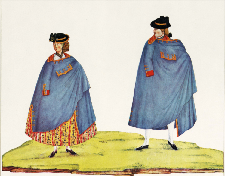 Homem e Mulher do Brasil colonial usando casaco e chapéu.